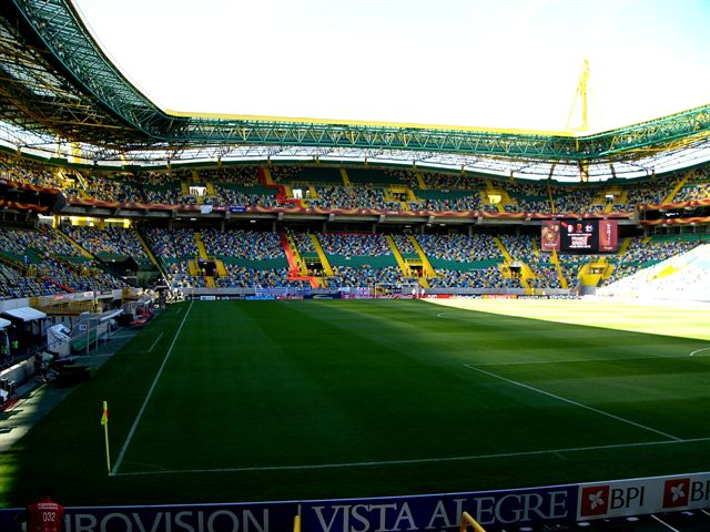 José-Alvalade-Stadion in Lissabon